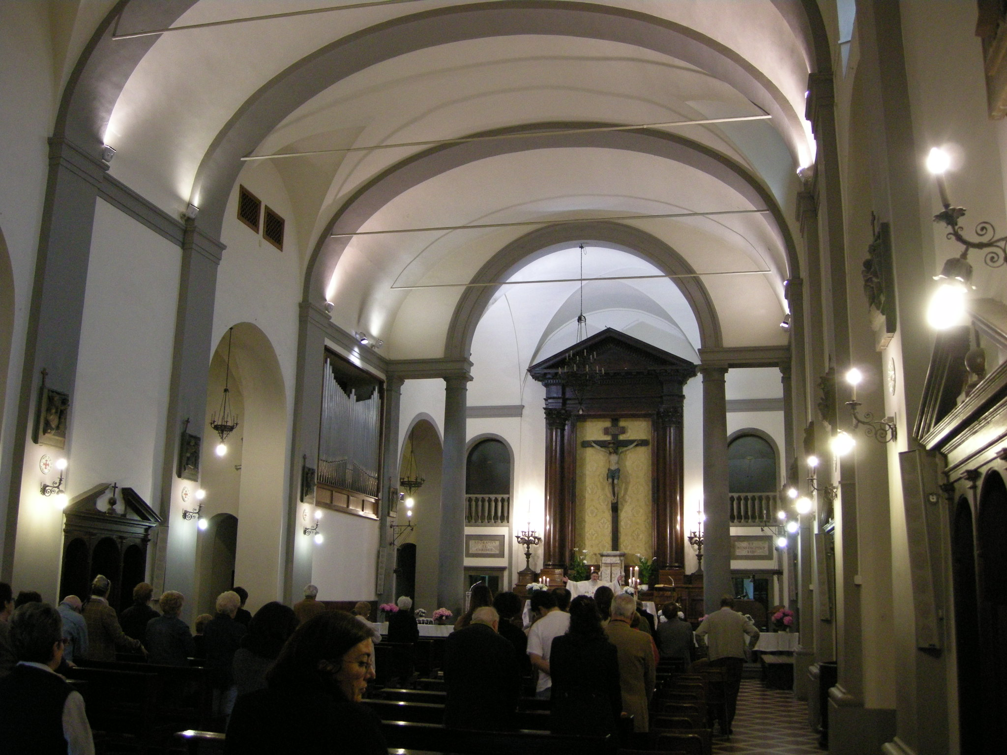 Chiesa dei santi francesco e chiara, interno